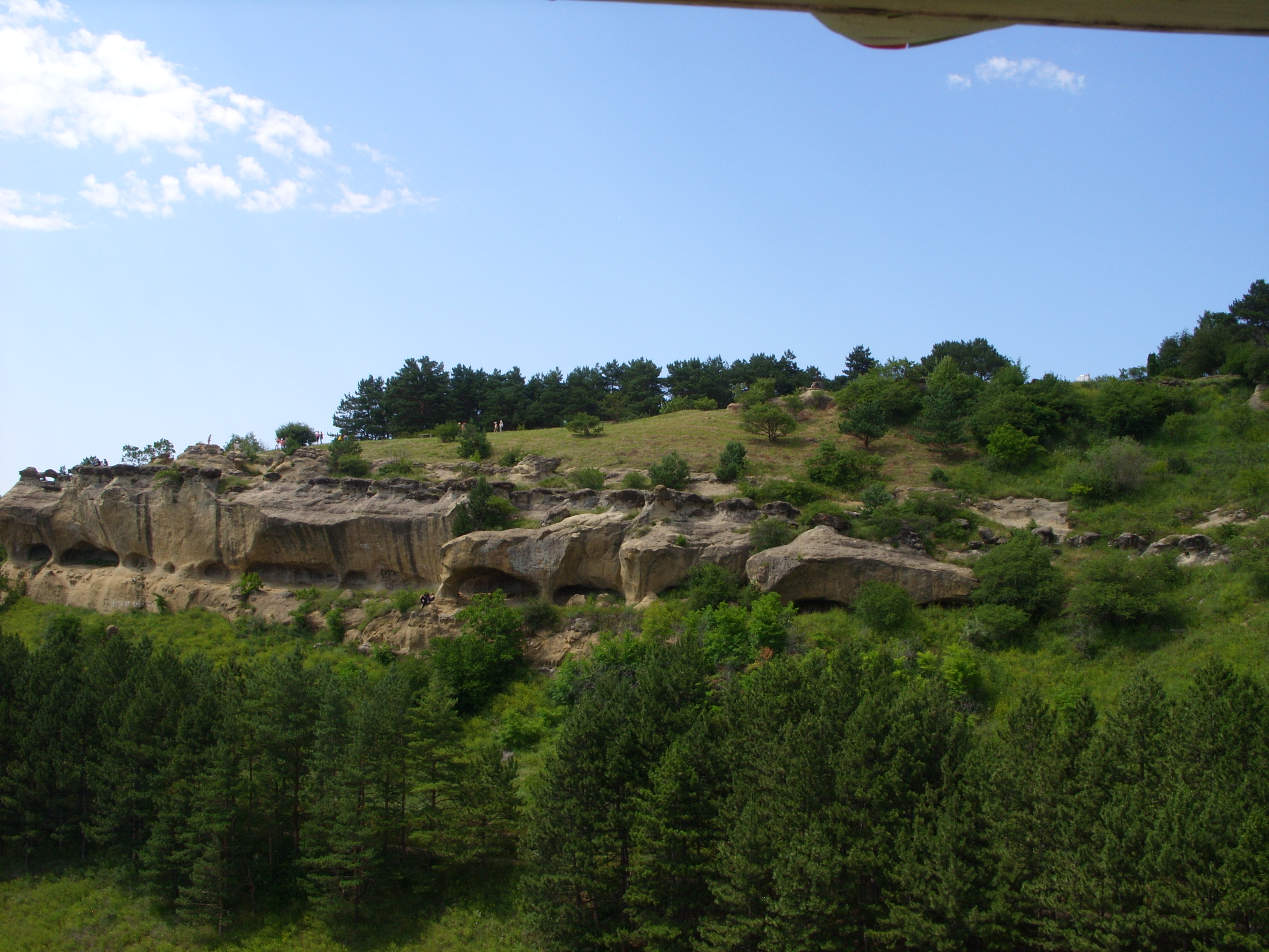 Снято на экскурсии из Железноводска, июль 2009 г.